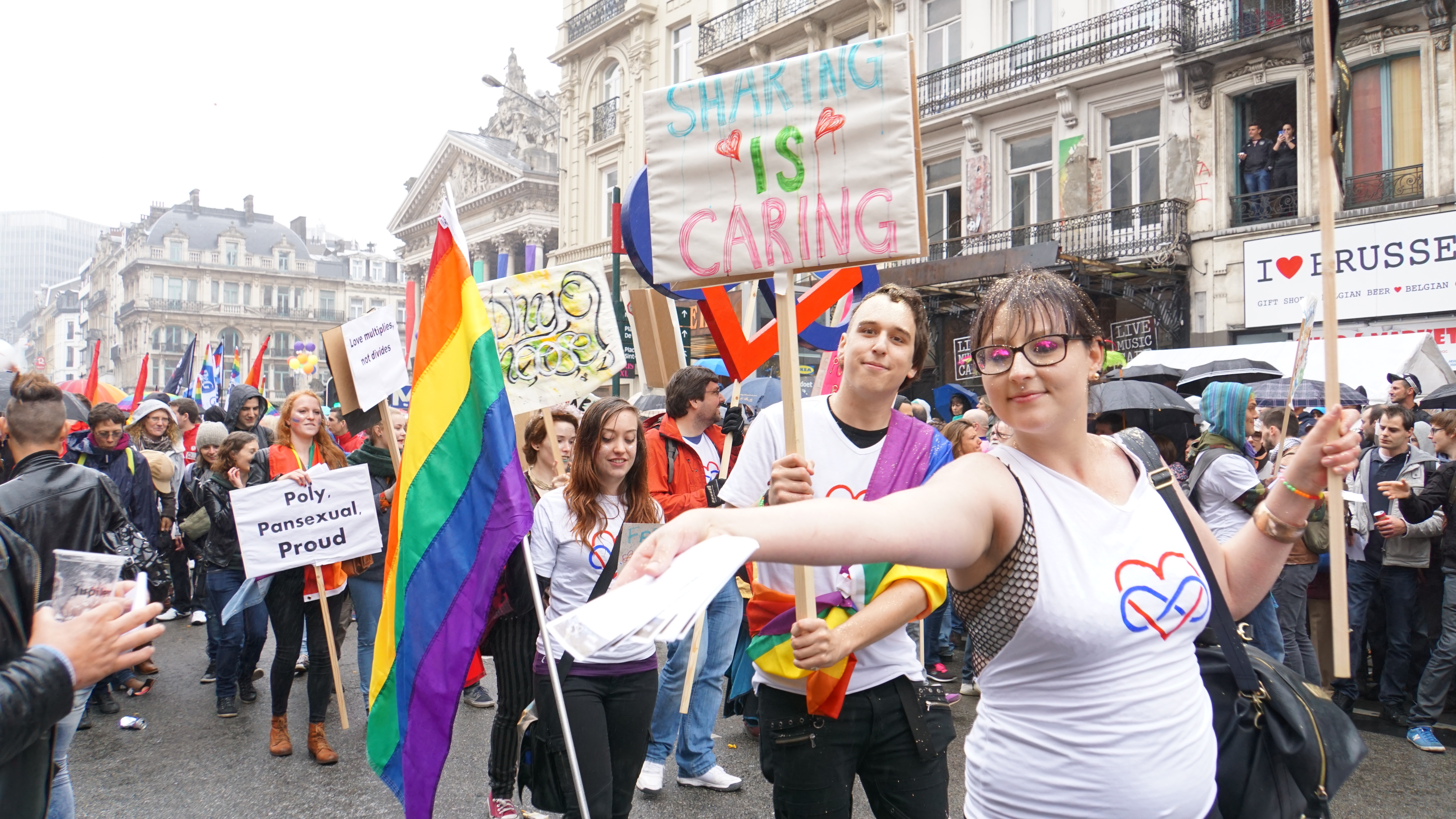 2015-05-16_14-56-34_ILCE-6000_DSC04807 Brussels Pride 2015